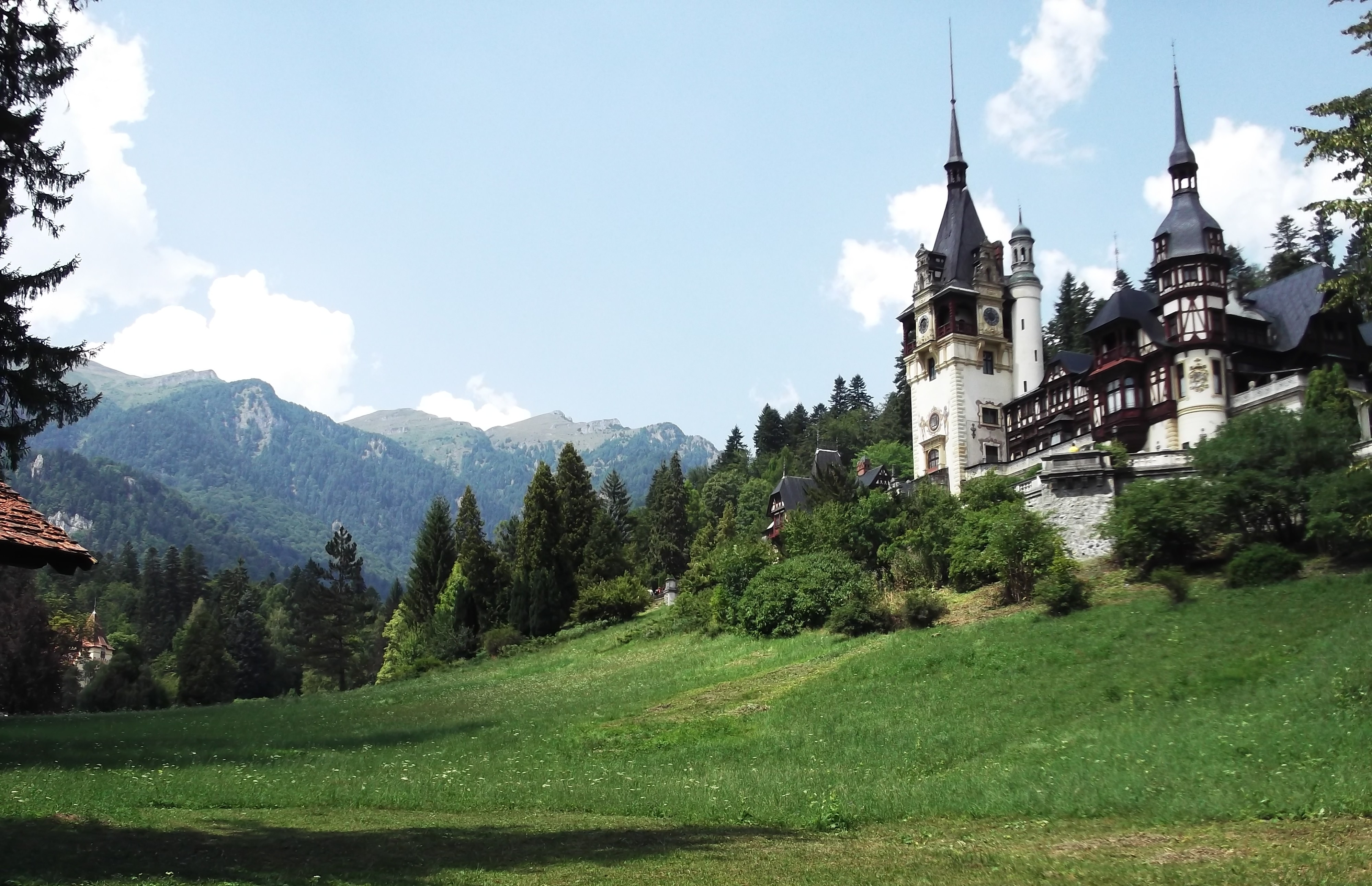 Castelul Peleş, Sinaia, România 01